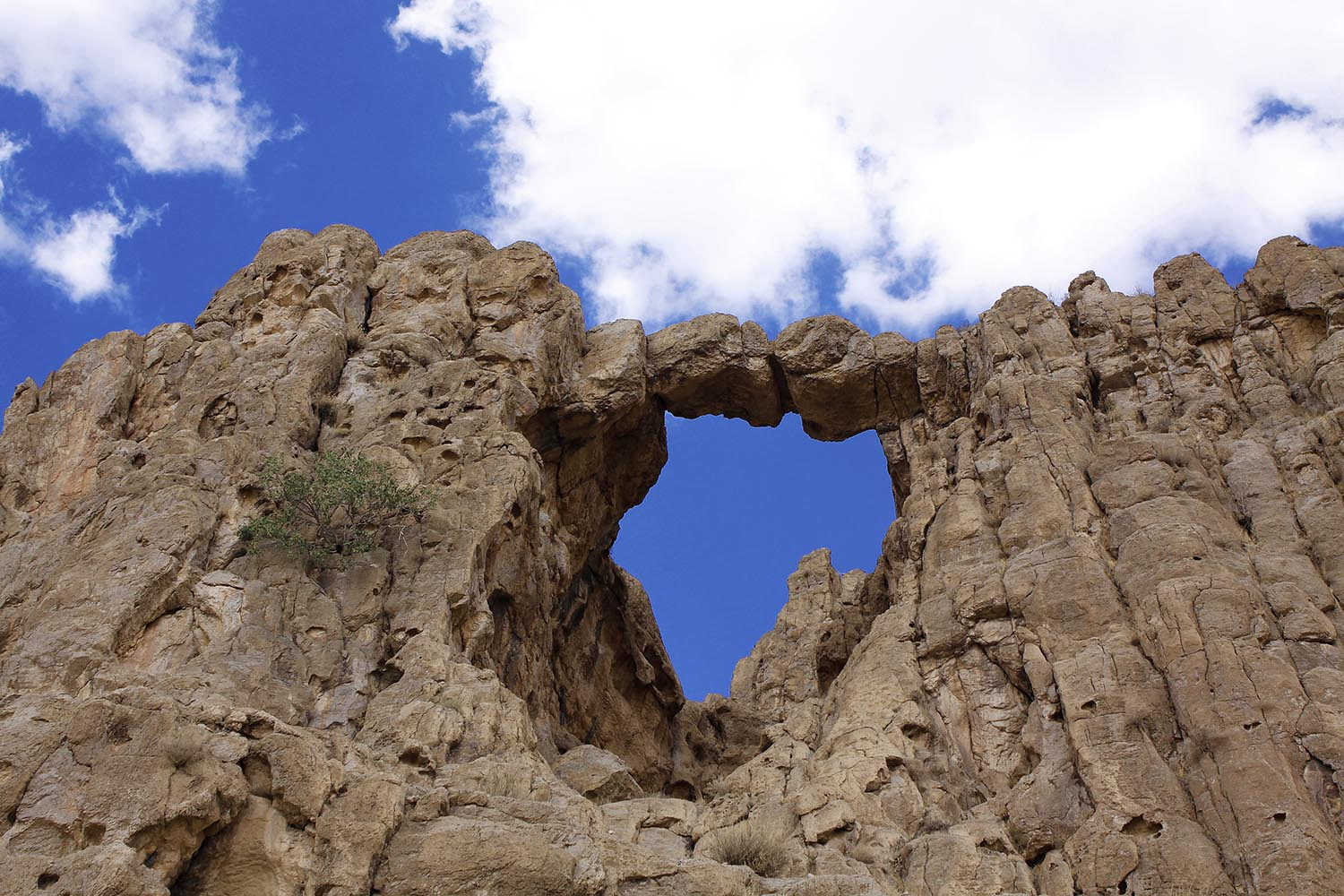 پناهگاه صخره‌ای پیر قوچ ۱